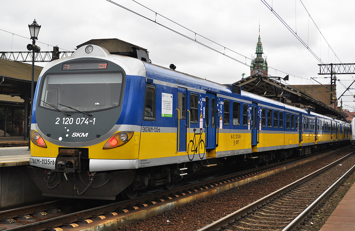 Elektryczny zespół trakcyjny EN57AKM-1135 stoi na stacji Gdańsk Główny.